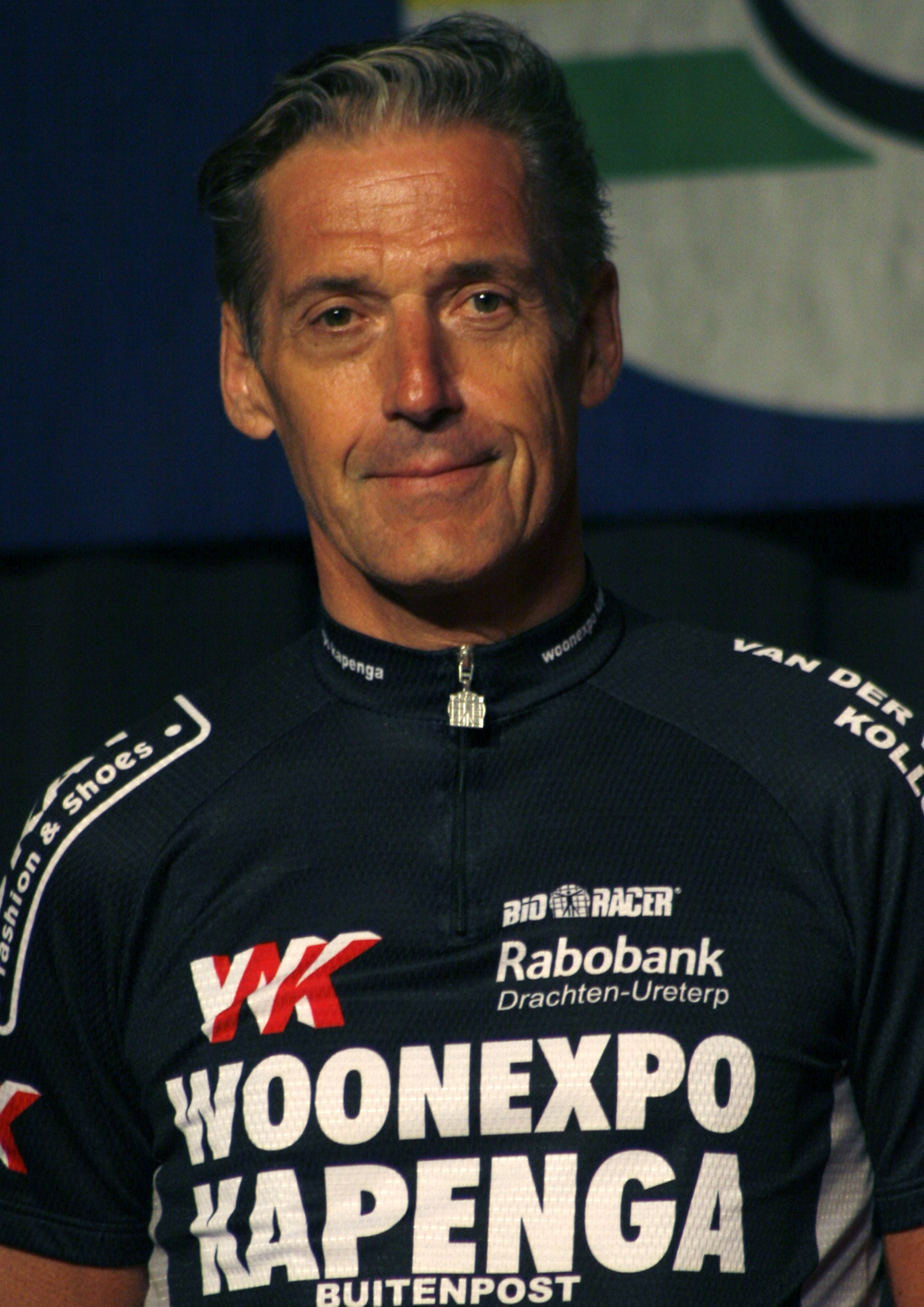 Jan Brander tijdens WK Masters